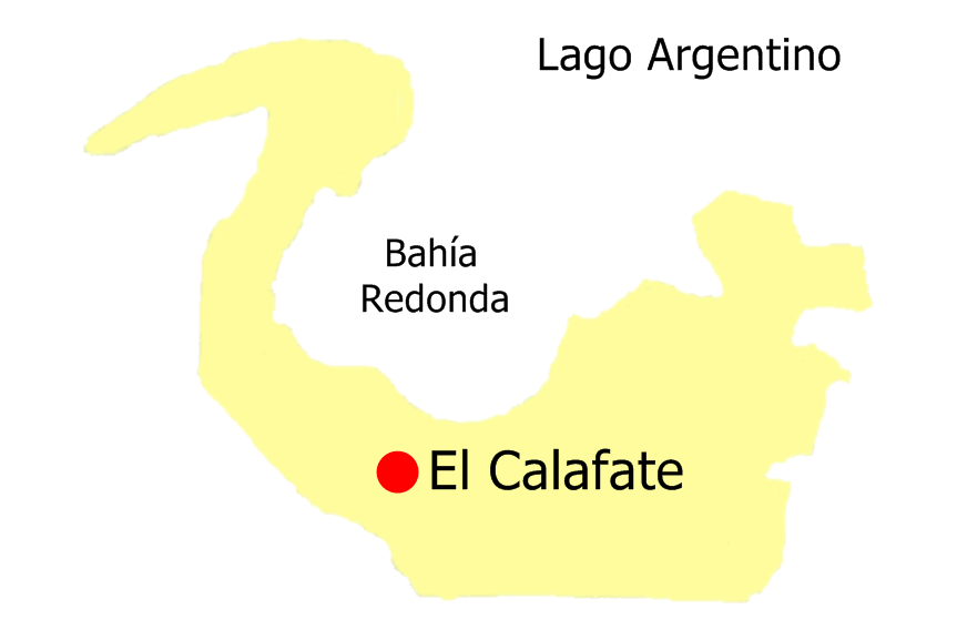 Mapa que realizé con la Ciudad de El Calafate